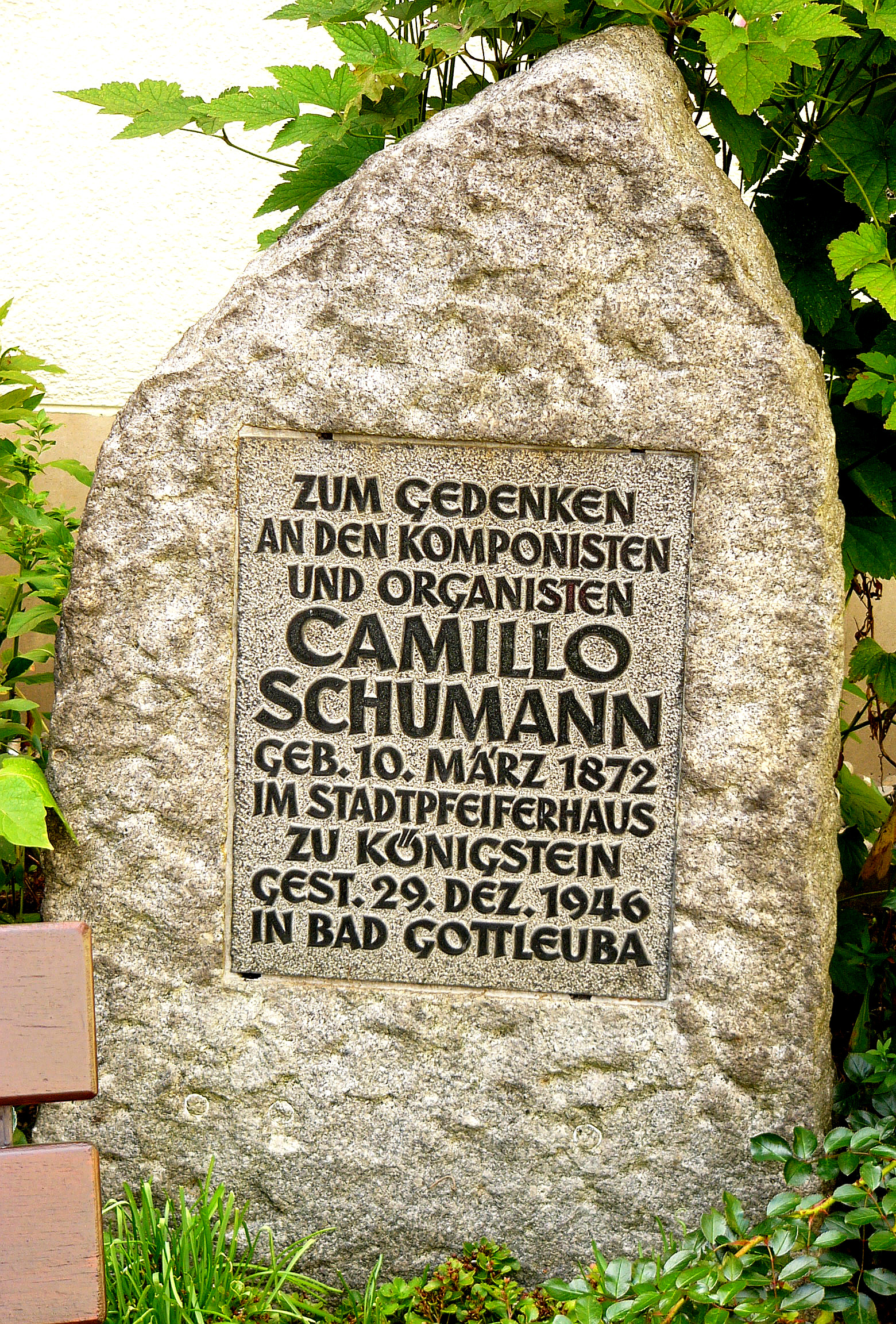 Gedenstein für Camillo Schumann in Königstein (Sächsische Schweiz)